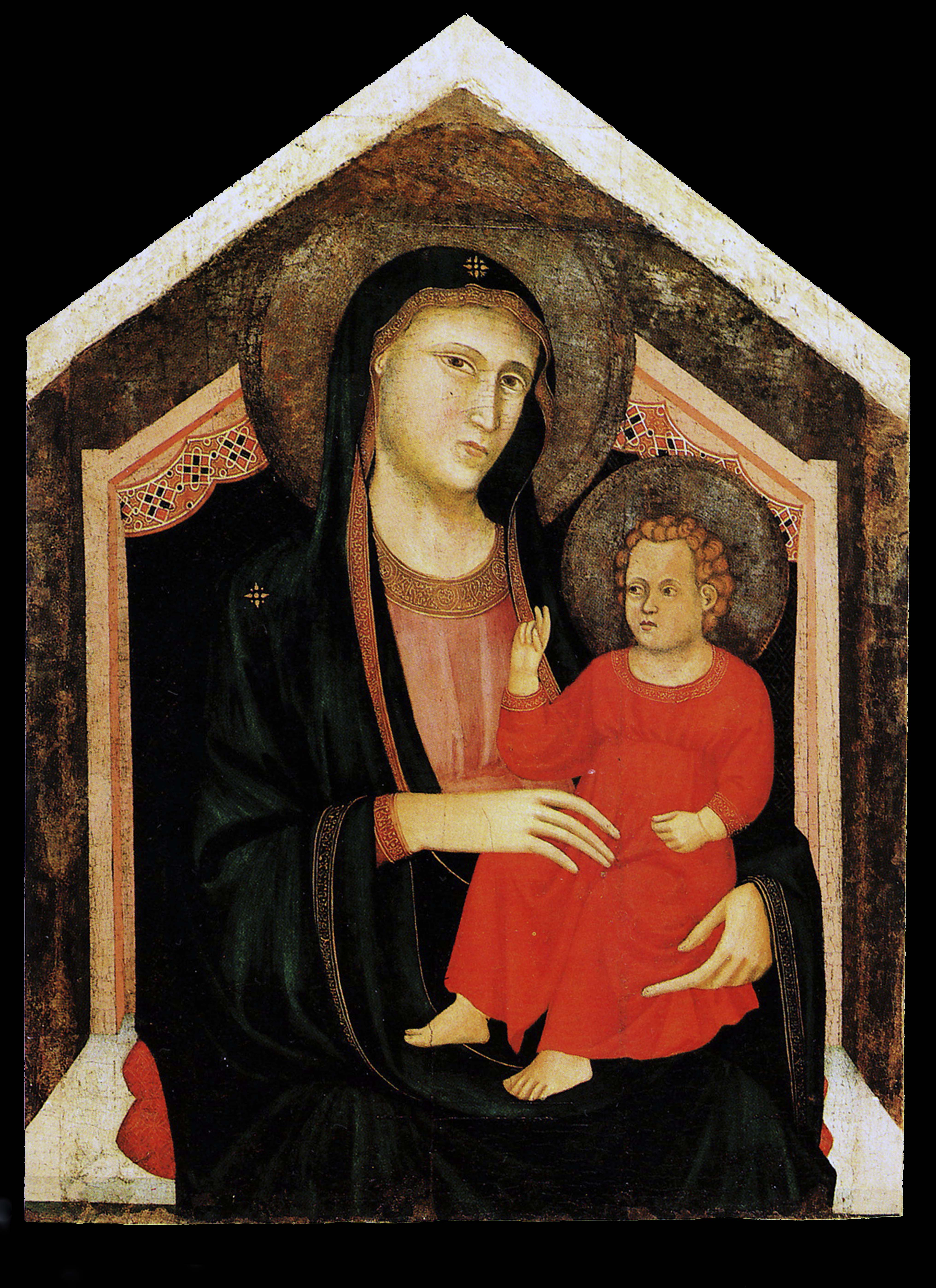 Madonna col Bambino, tempera su tavola della fine del secondo decennio del XIV secolo, opera del Maestro del Trittico Horne